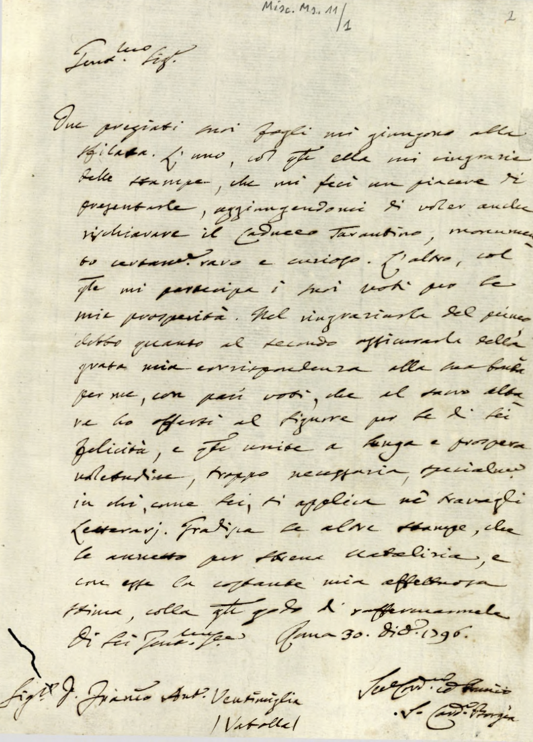 Fa parte di una miscellanea di carteggi, messaggi e opuscoli a stampa del sec. XVIII di dimensioni varie con legatura coeva in pergamena rigida. Il titolo d’insieme è apposto in oro su un tassello sul dorso. La miscellanea contiene una corrispondenza manoscritta fra il cardinale Stefano Borgia ed esponenti della famiglia Ventimiglia (Domenico, Francesco Antonio), con qualche lettera a/di altri corrispondenti, nonché, cuciti insieme nella medesima legatura, otto opuscoli a stampa di vari autori, tutti di argomento antiquario e relativi al Museo Borgiano di Velletri.